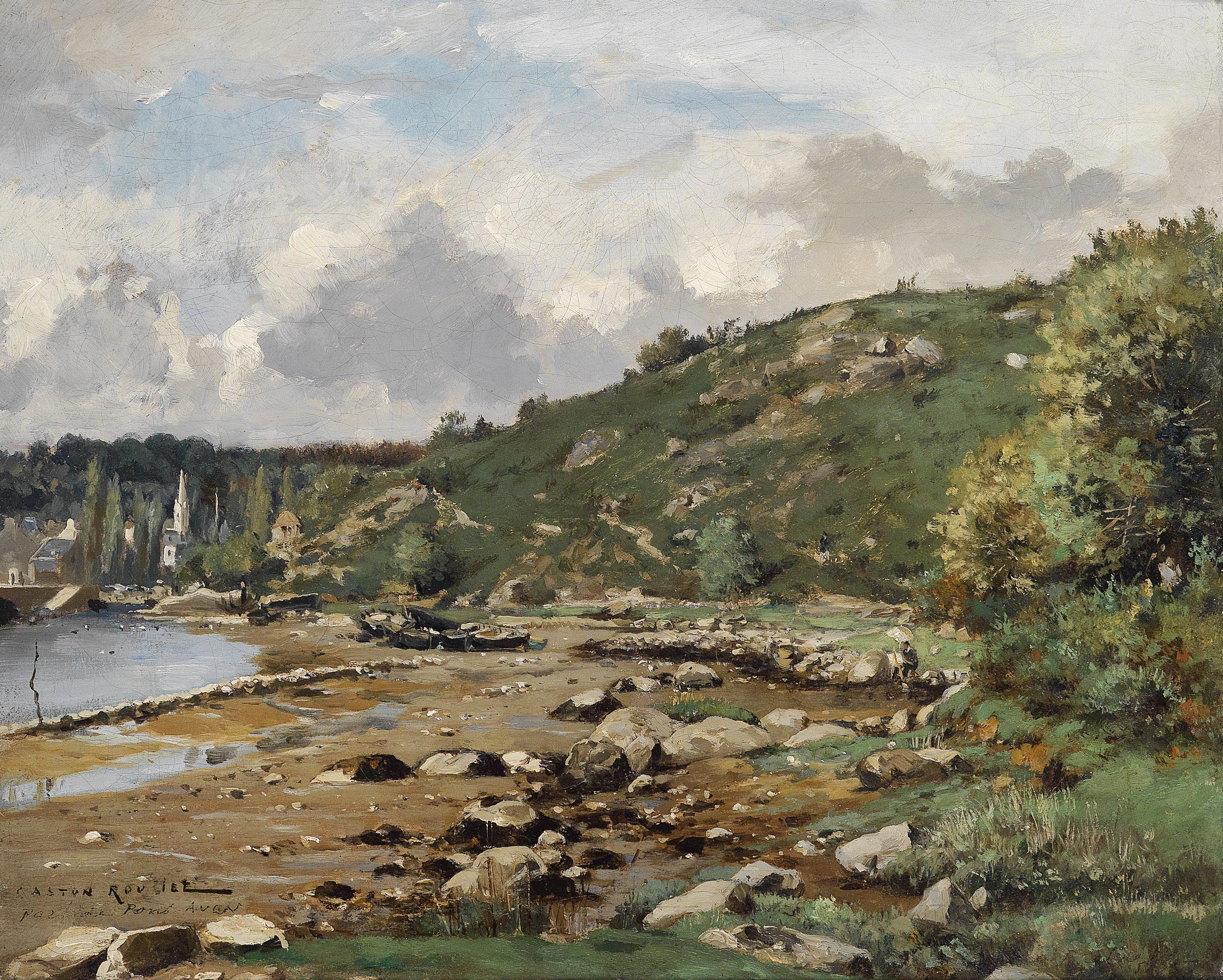 "Port de Pont-Aven", signiert Gaston Roullet, Öl auf Leinwand, 38 x 46 cm